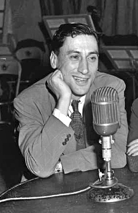 Roger Baulu assis à une table devant un micro sur la scène d'une salle de spectacle lors de l'enregistrement par C.B.C. (Radio-Canada) du jeu questionnaire «Le Mot S.V.P.» (Note : En date d'avril 2014, une notice de BAnQ identifie la personne à côté de Roger Baulu comme étant Jovette Bernier [1] et une autre notice de BAnQ identifie la même personne sur la même photo comme étant Nicole Germain [2]. Nous retenons ici l'identification de Jovette Bernier, qui semble la plus plausible. La notice qui mentionne Nicole Germain semble être une erreur.)